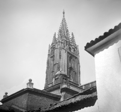 Imatge